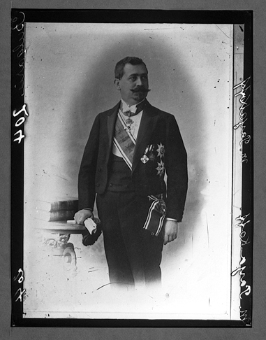 Лазар Паяков. Фотография около 1908; електронно копие от негатив върху стъклена плака; снимка около 1908 г. архив на Кодак, Франция: George Eastman House Still Photograph Archive